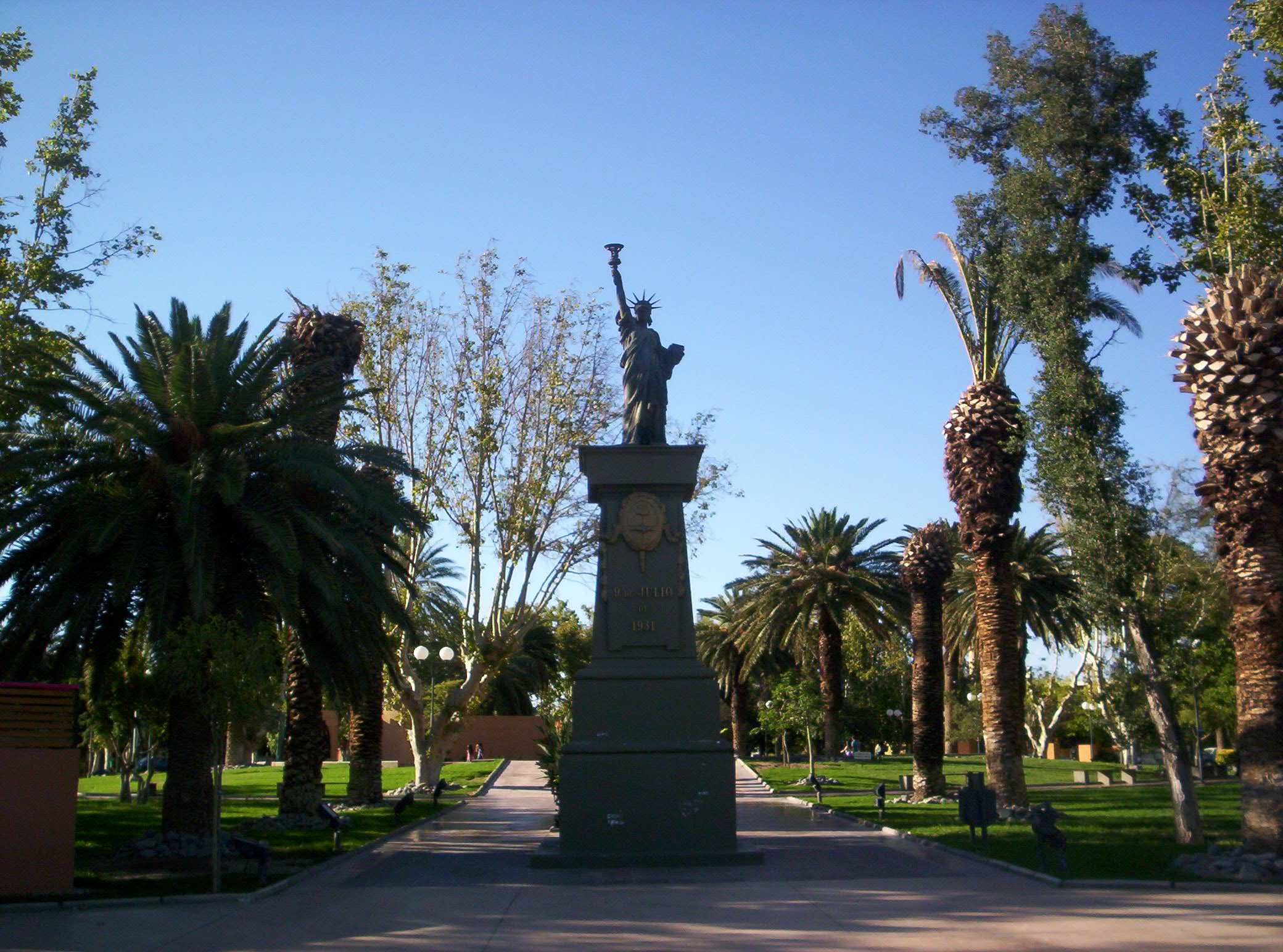 Busto de una replíca de la Estatua de la Libertad en la Villa Aberastain, departamento Pocito, San Juan, Argentina